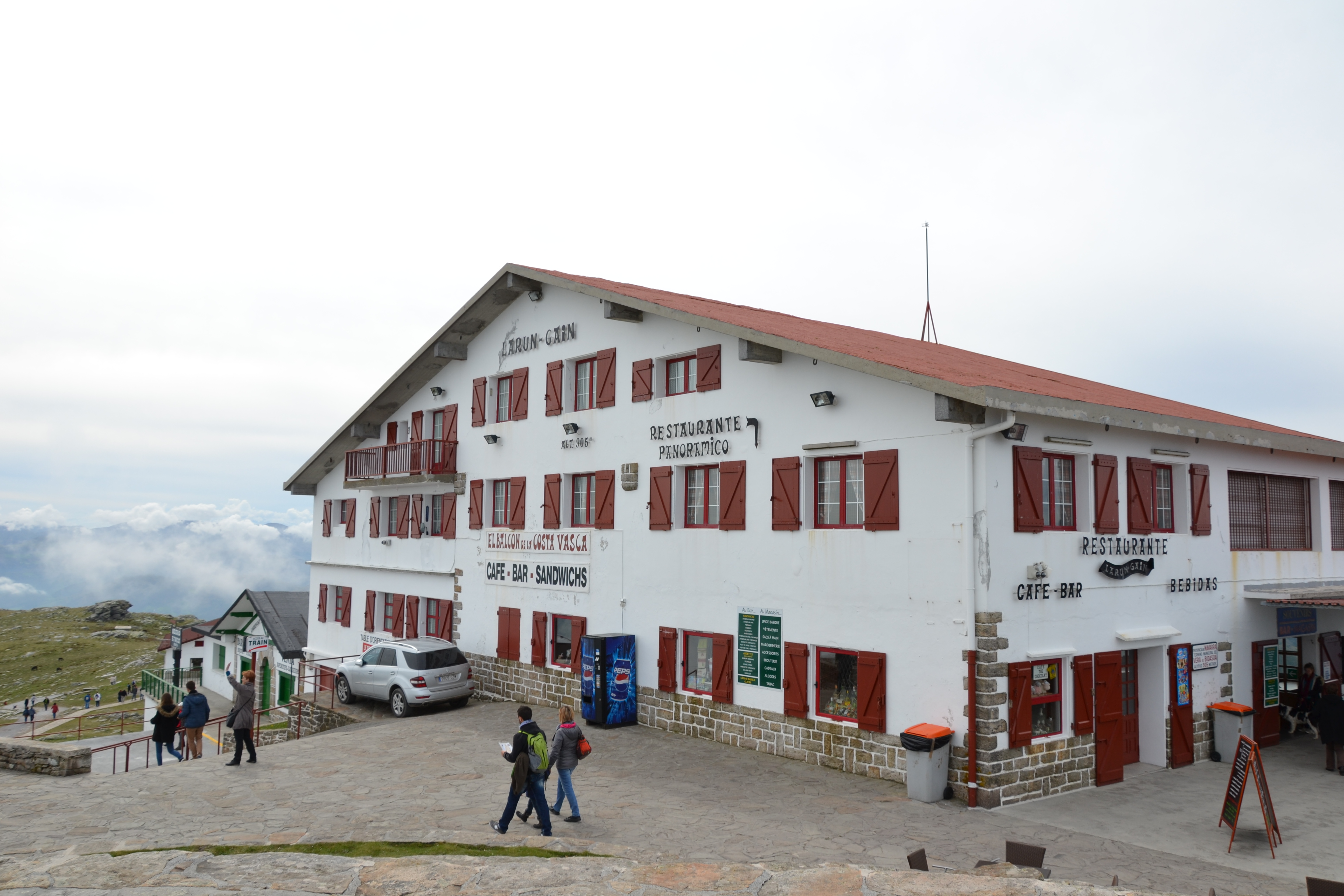 Magasins du sommet de la Rhune